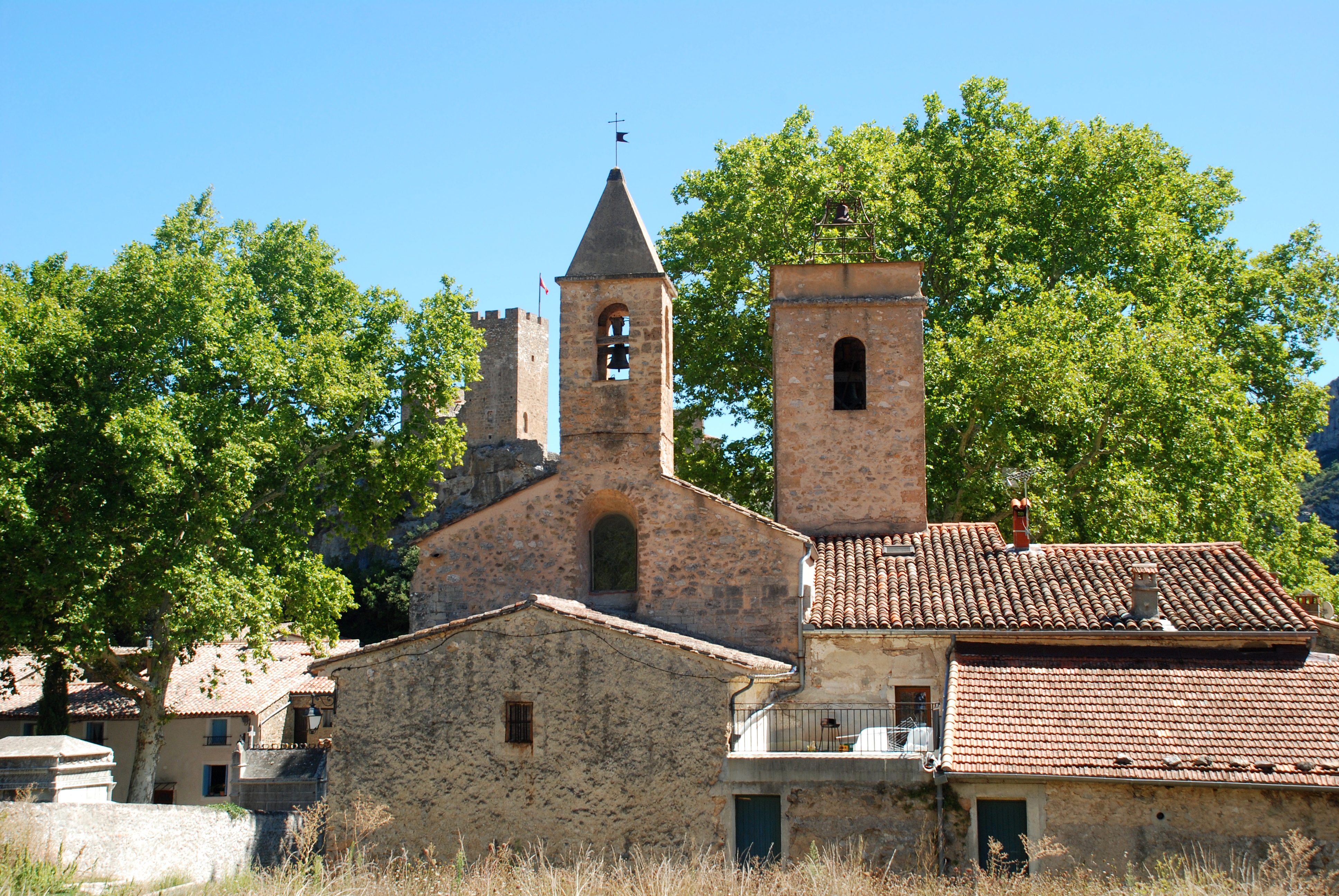 France - Hérault - Église de Saint-Jean-de-Buèges